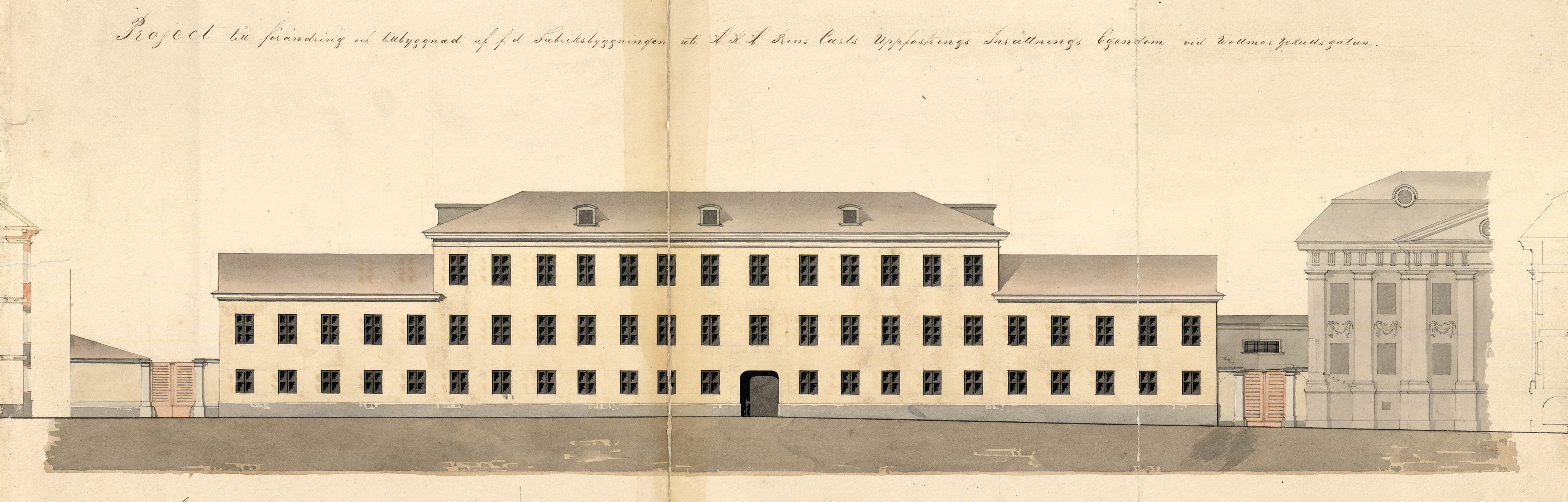 Ombyggnadsritning av fabriksbyggnaden på Reenstiernas tomt, beställare Prins Carls uppfostringsinrättning för fattiga barn.